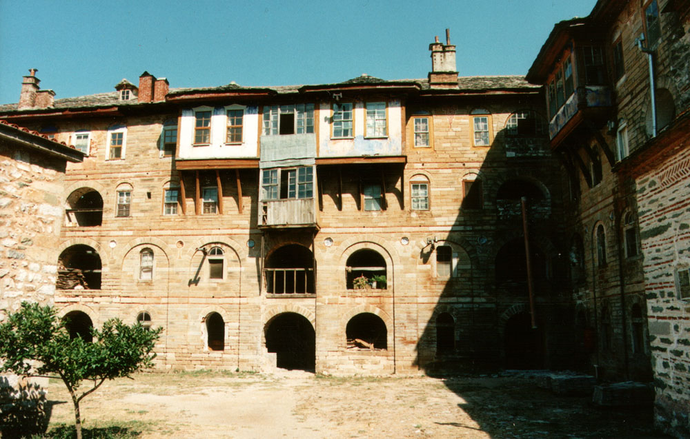 Im Hof des Klosters Megisti Lavra